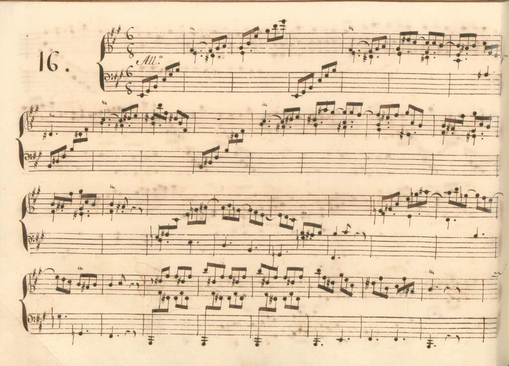 La sonate K. 403, telle qu'elle se présente dans le manuscrit de Parme, volume XI no. 16.